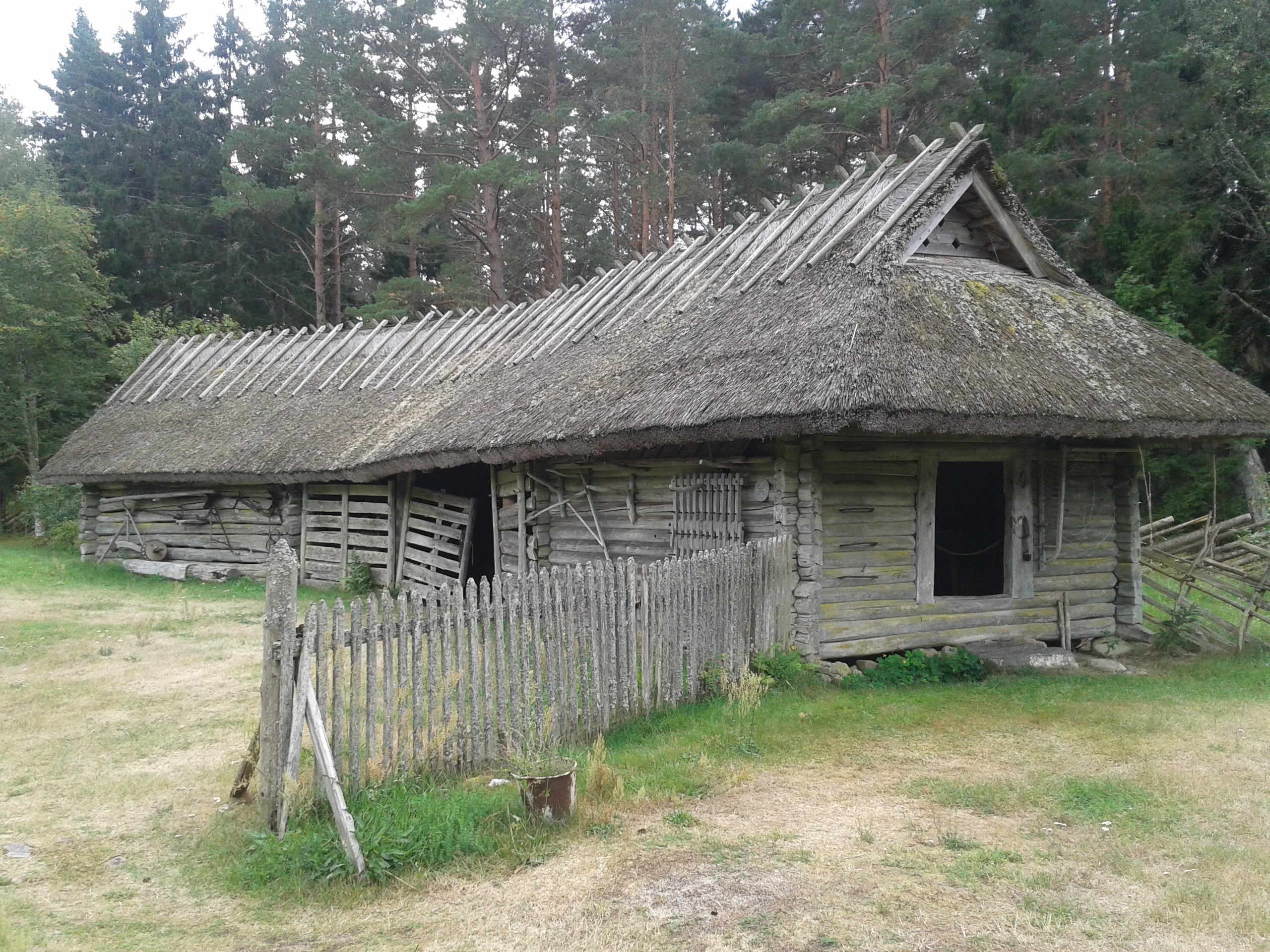 Mihkli talumuuseumi pöördusega ehk kõverait.